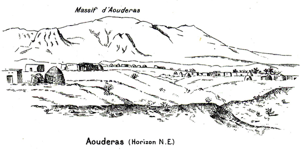 Mission Foureau-Lamy : Aouderas.